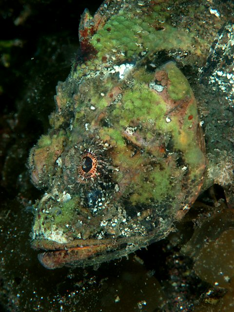 サツマカサゴ Scorpaenopsis neglecta